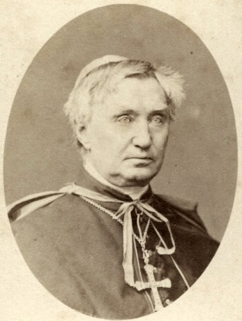 Georg Anton von Stahl, Bischof von Würzburg